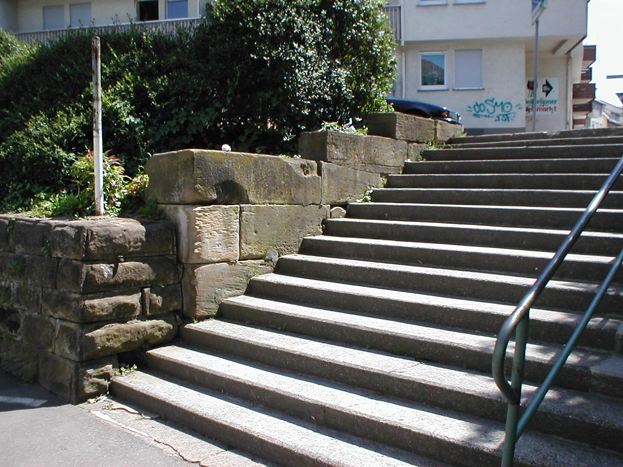 Trümmersteine der Kriegszerstörung von 1944 dienen zur Hangbefestigung. Götzenturmstraße, Heilbronn.